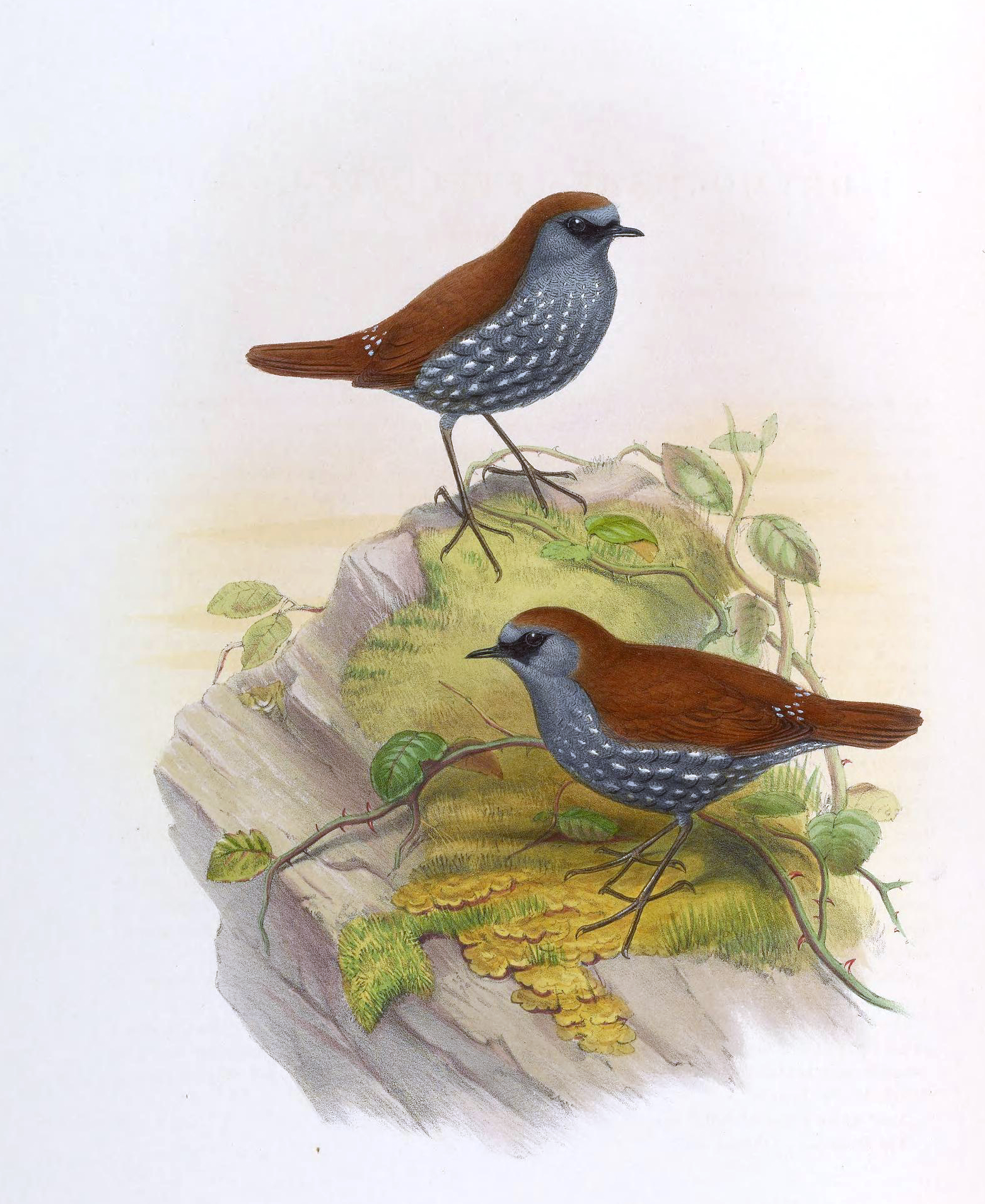 Drymochares stellatus = Heteroxenicus stellatus